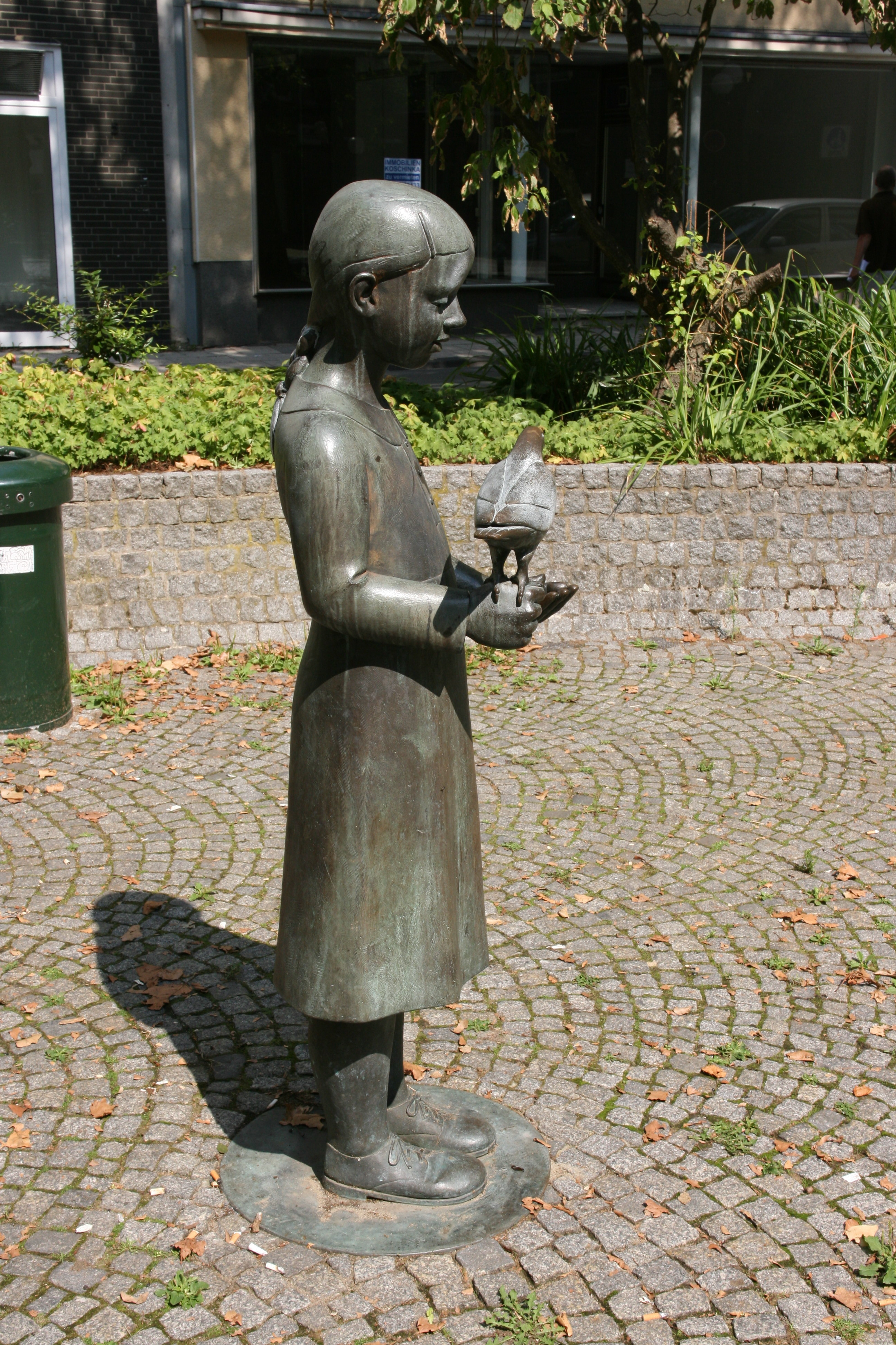 „Mädchen mit Taube“ von Anette Wittkamp-Fröhling, Antoniusplatz in Herten